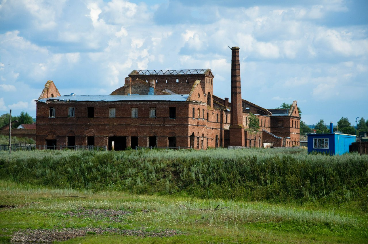 Комплекс Воскресенского медеплавильного завода: Воскресенское, Мелеузовский район, Башкортостан